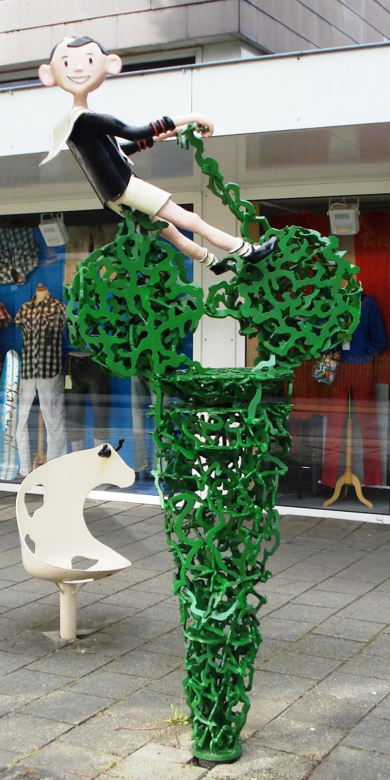 Rheden - Dieren, Wilhelminaweg - Spankerense. Kunstwerk "Piet Pelle" van Ralph Lambertz. Rheden - Dieren/The Netherlands. FOP.